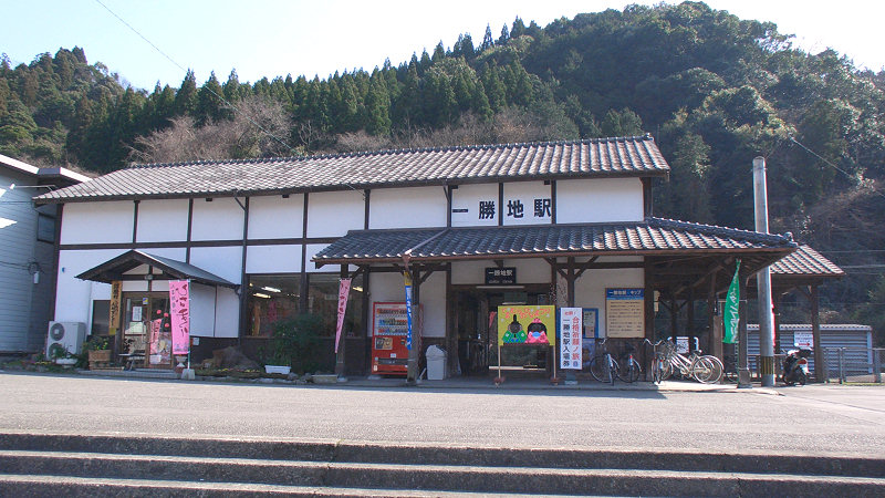 JR肥薩線一勝地駅 駅舎 撮影者/著者/著作権保有者 : MK Products (本人がアップロード) 撮影日 : 2007/02/24 一勝地駅用にアップロードした画像です。良い画像があれば別の画像に変えてください。